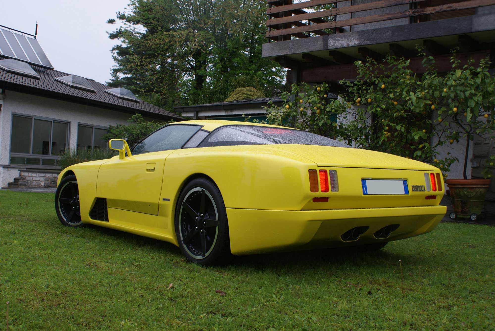 Iso Rivolta Grifo 90 - 2010